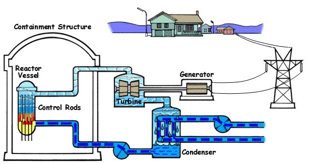 Schéma d' REB